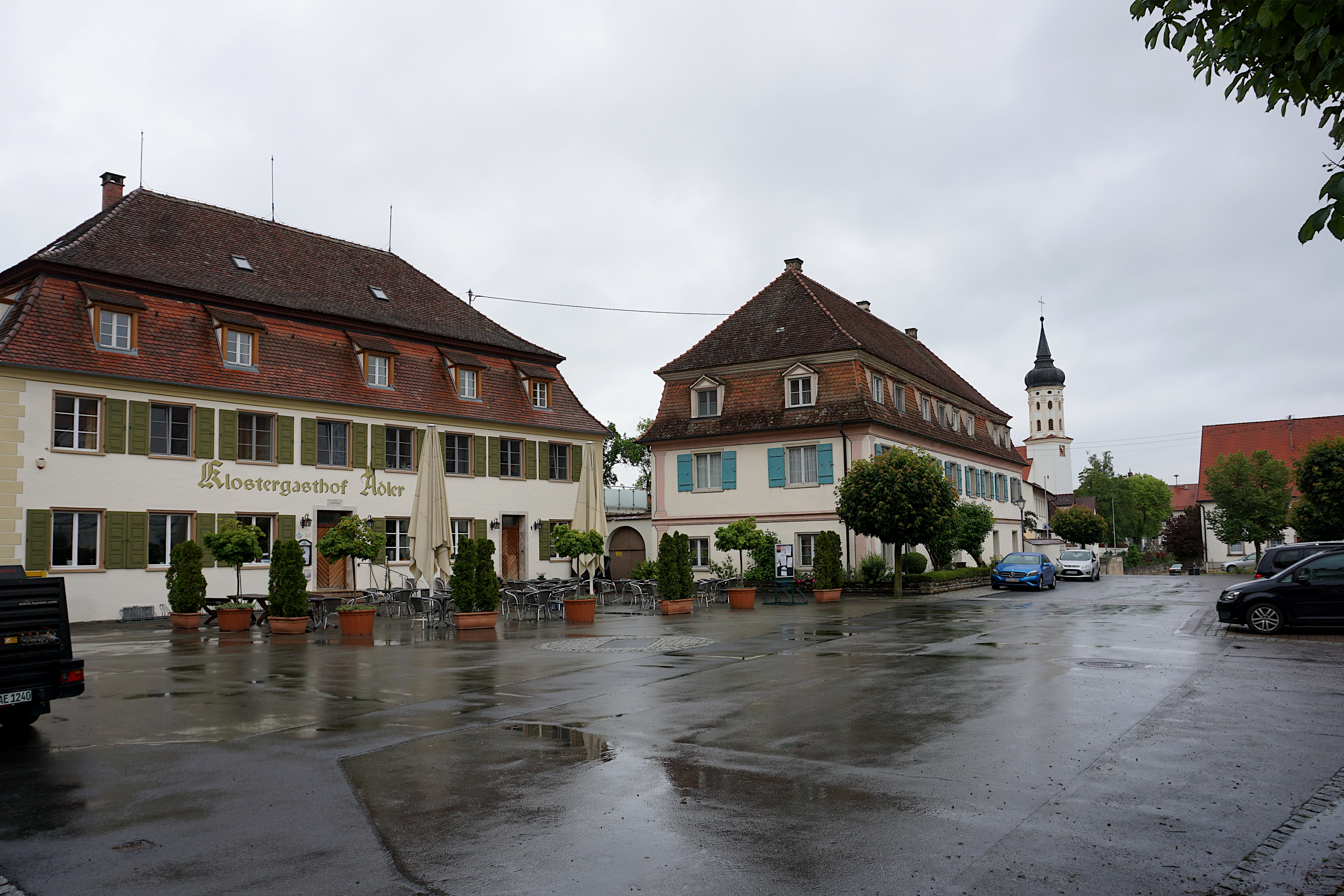 Ortskern Obermarchtal; die Hauptstraße.